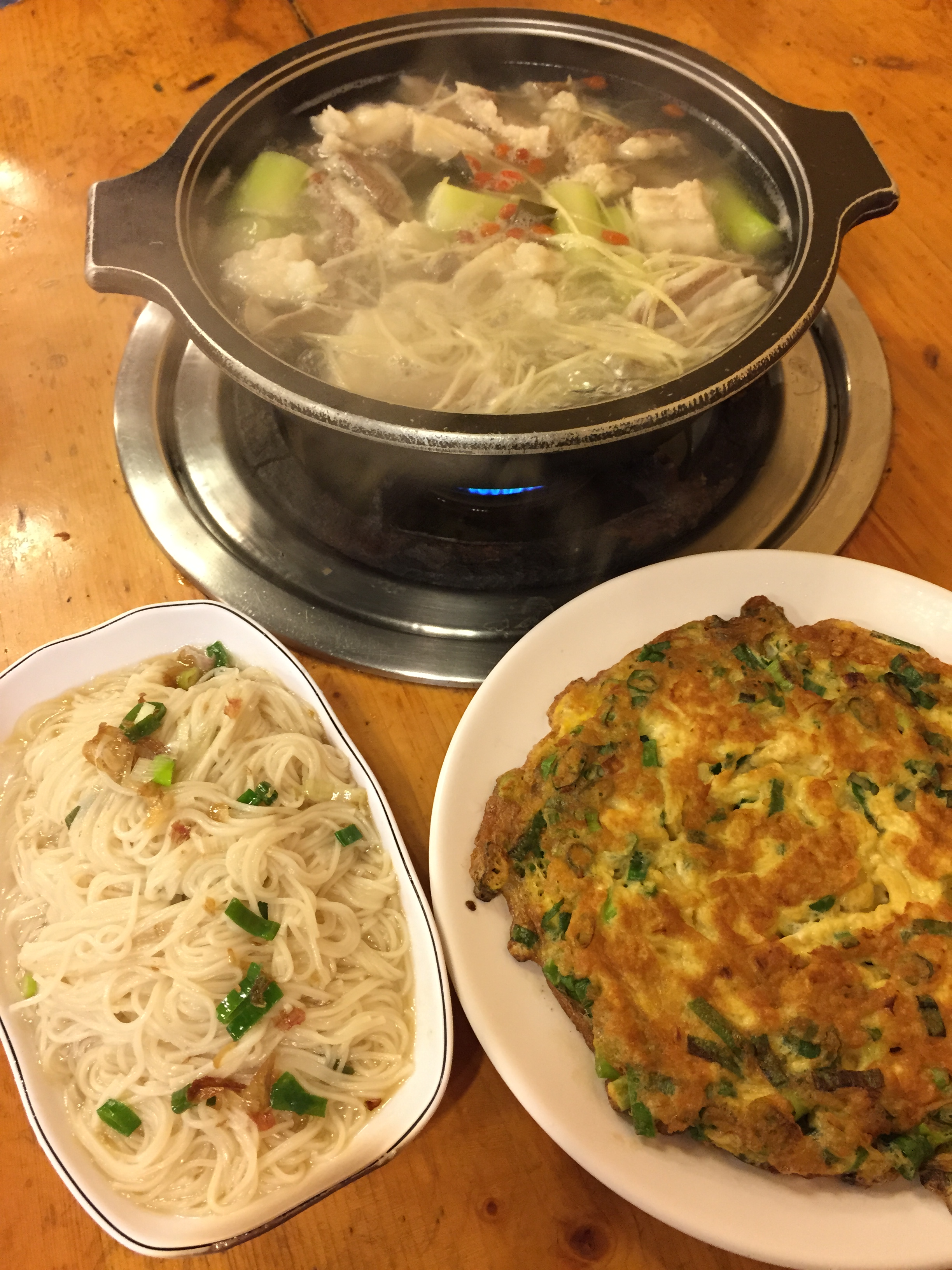 Assiettes de plats taïwanais. Marmite de mouton en haut, vermicelles sautées à gauche et omelette au radis salé à droite.